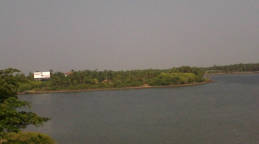 ചേറ്റുവ തുരുത്ത്. ചേറ്റുവ പുഴയുടെ മദ്ധ്യത്തിലുള്ള ഒരു തുരുത്താണിത്.